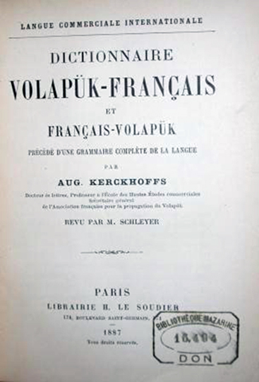 Dictionnaire volapük-français et français-volapük, précédé d'une grammaire complète de la langue : Langue commerciale internationale. Document imprimé. Paris : H. Le Soudier. Title page.